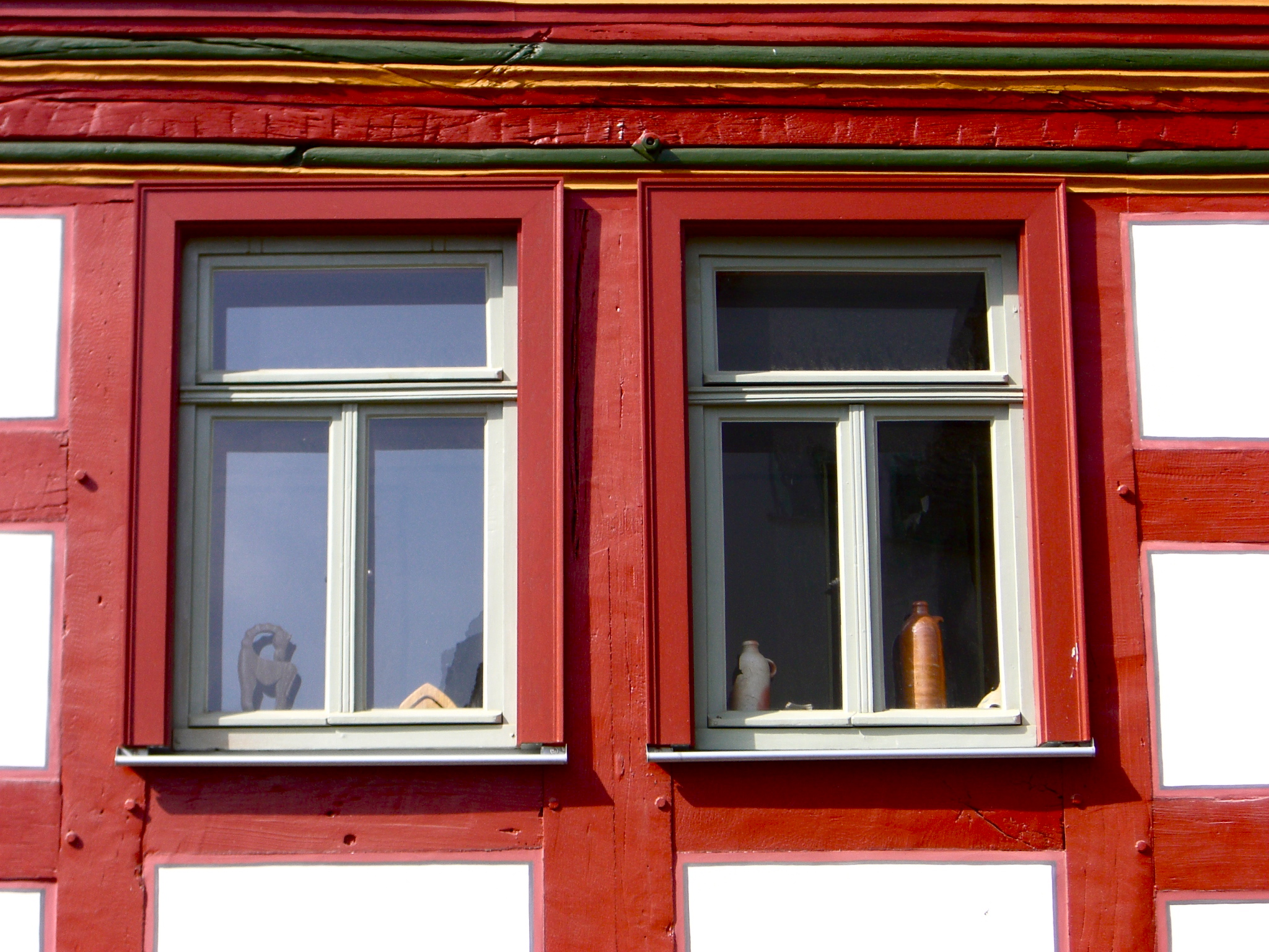 Fensterrestaurierung unter Verwendung von Leinölfarbe. Hofanlage Mittelstraße 1 in Hünfelden-Nauheim, Hessischer Denkmalschutzpreis 2010.